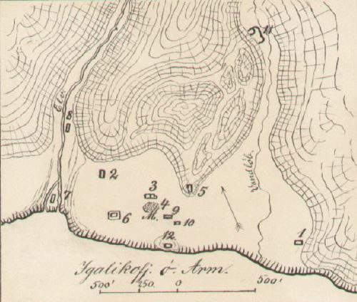 Plan du site archéologique Ø 64, en bordure de fjord d'Igaliku, à Vatnahverfi.